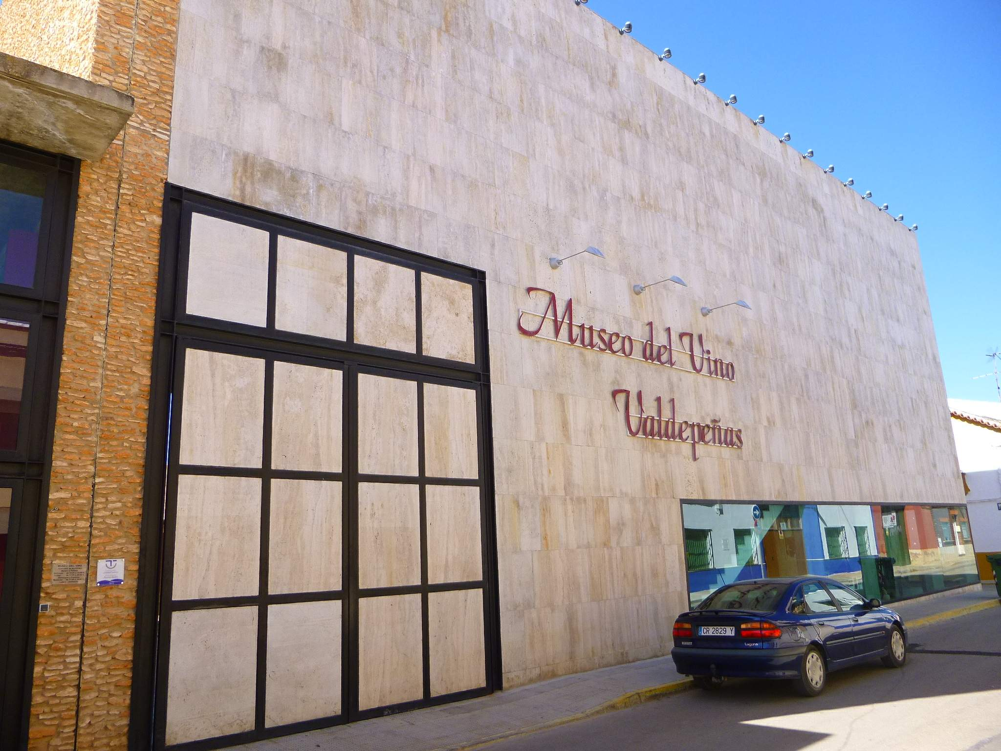 Museo del Vino (Valdepeñas)